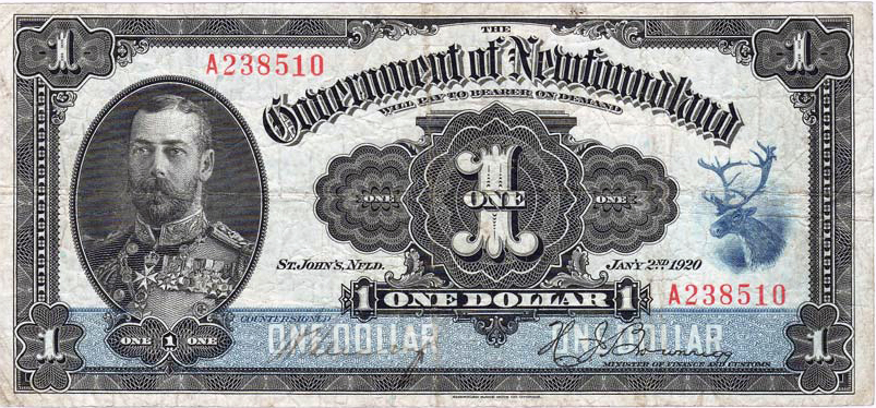 Newfoundland dollar bill